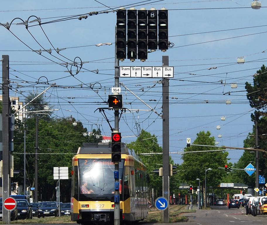 Straßenbahnsignale an einer Tram-+Busspur an der Ebertstraße in Kalsruhe